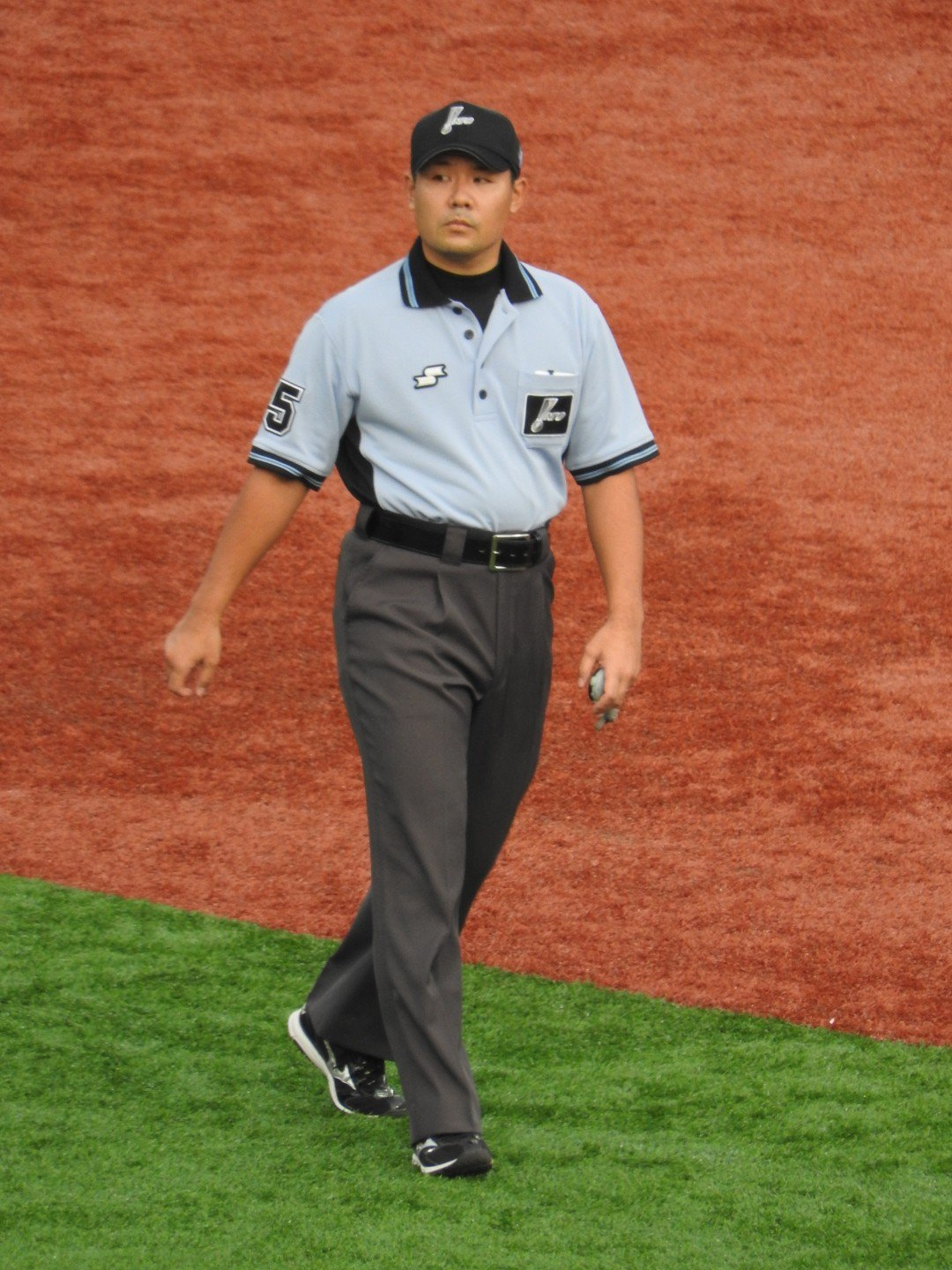 2019年7月31日横浜スタジアムにて